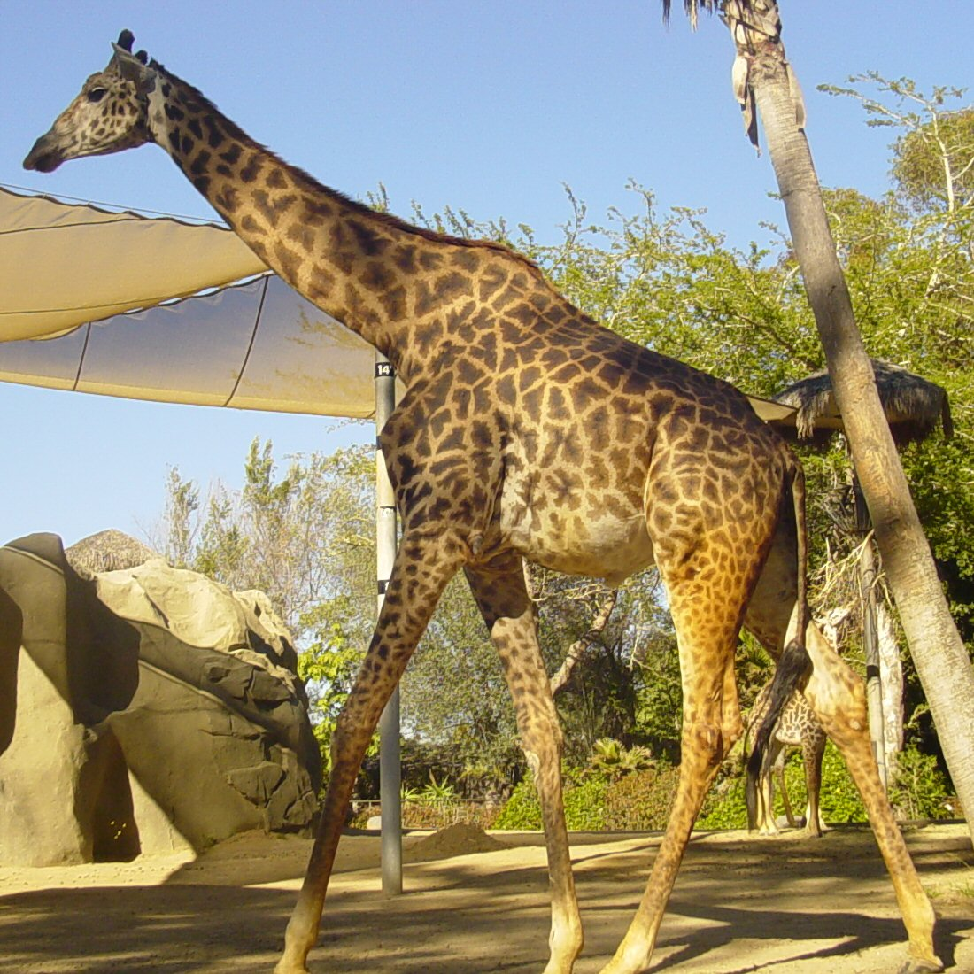 Male Masai giraffe at San Diego Zoo